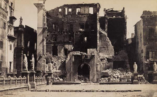 Palerme. Palais Carini. Par Gustave Le Gray, juin 1860.